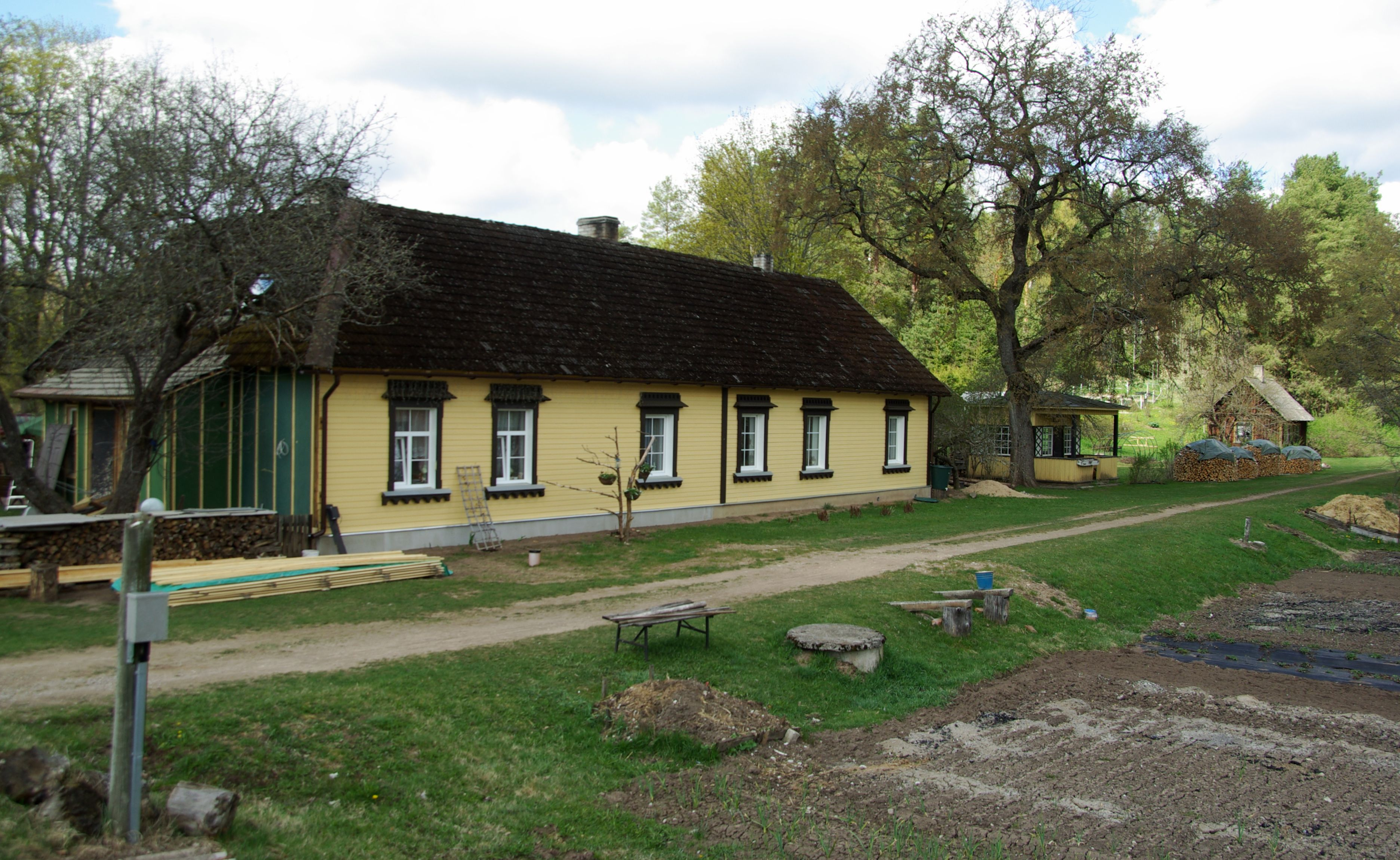 Sinialliku raudteejaam oli raudteejaam Sinialliku külas Mõisaküla–Viljandi raudteelõigul. Hoonet on mitmed korrad ümber ehitatud.